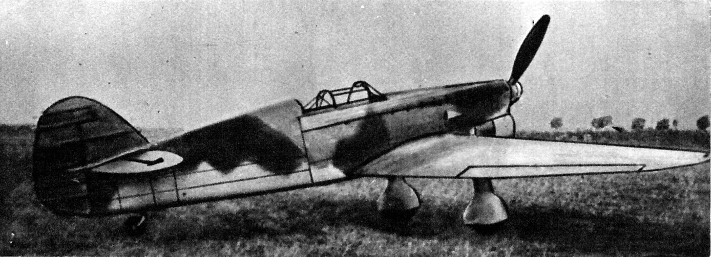 Czechosłowacki samolot myśliwski Avia B.35.